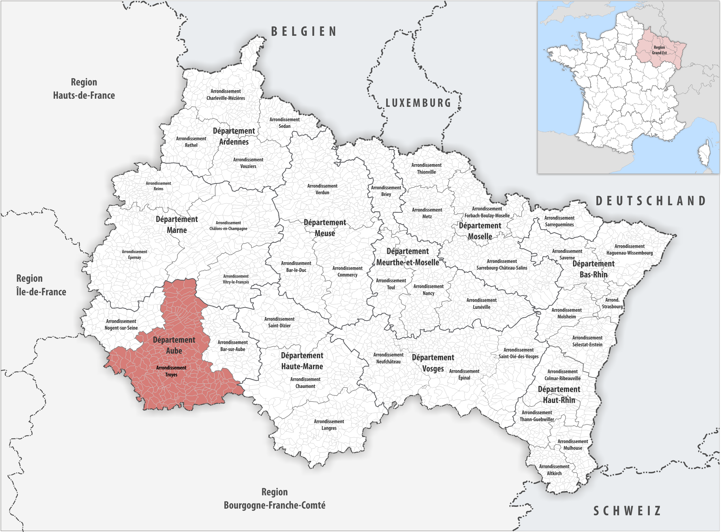 Lage des Arrondissements Troyes